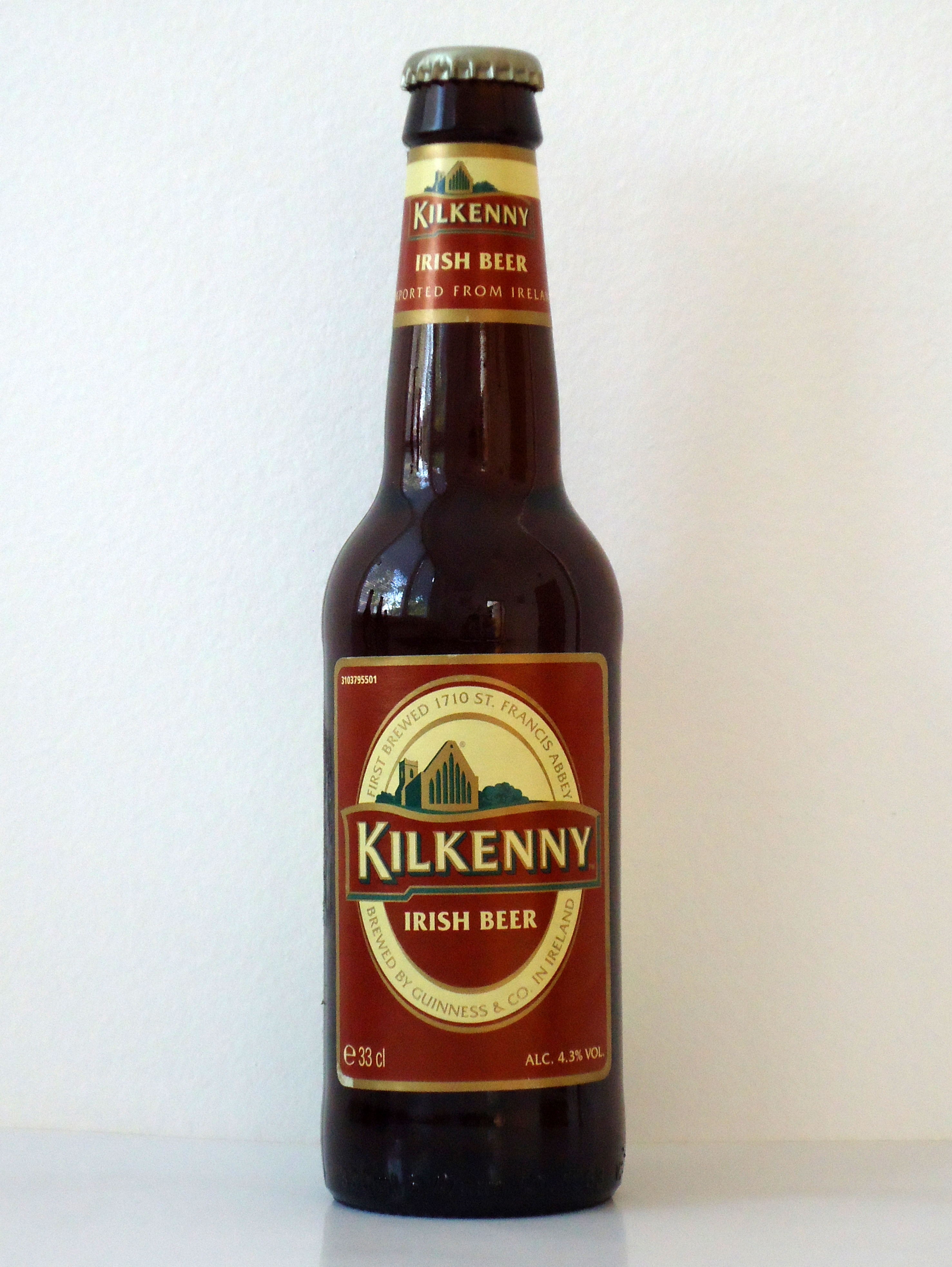 бира Килкени